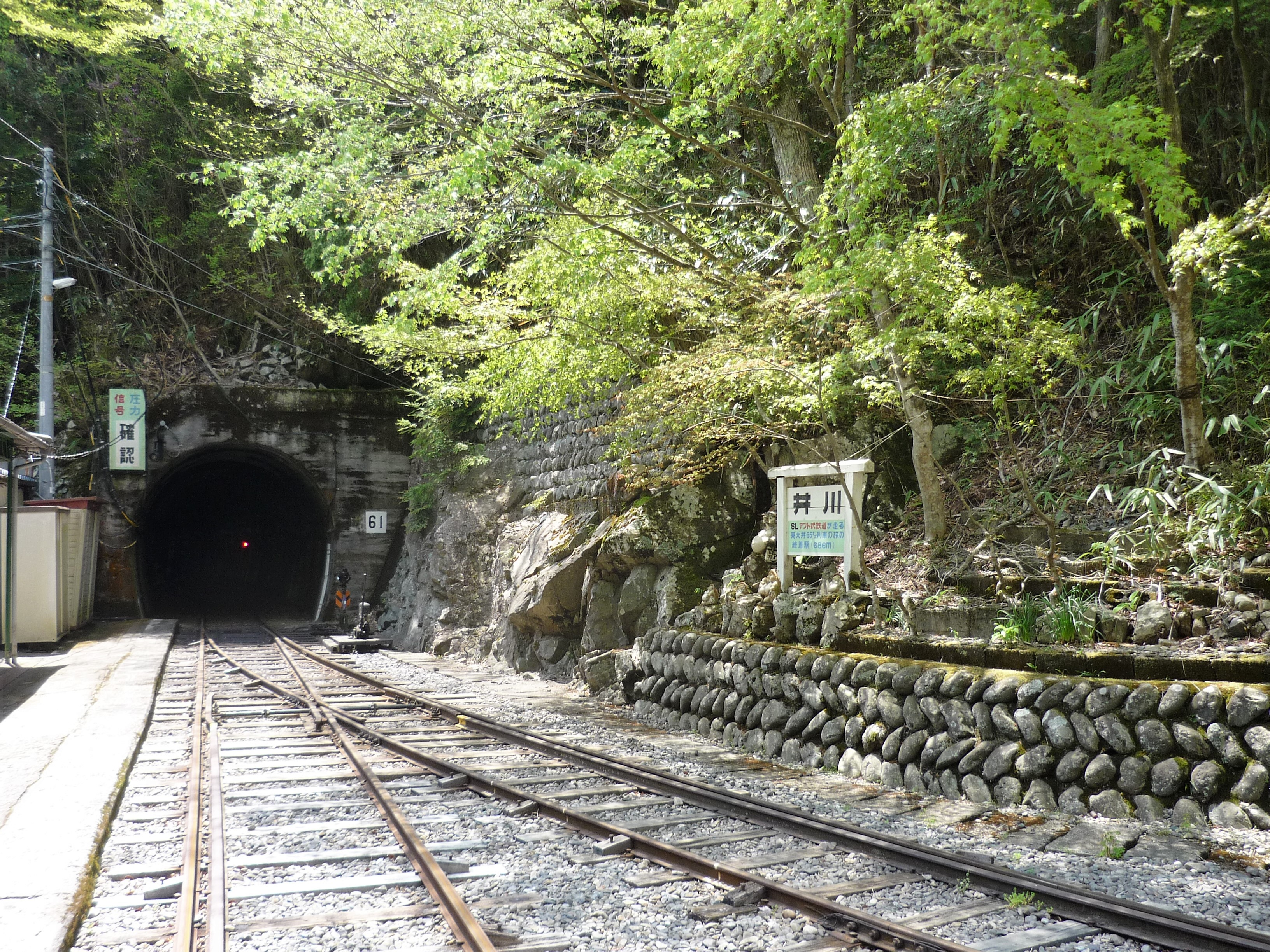 大井川鉄道・井川駅（千頭方面を望む）